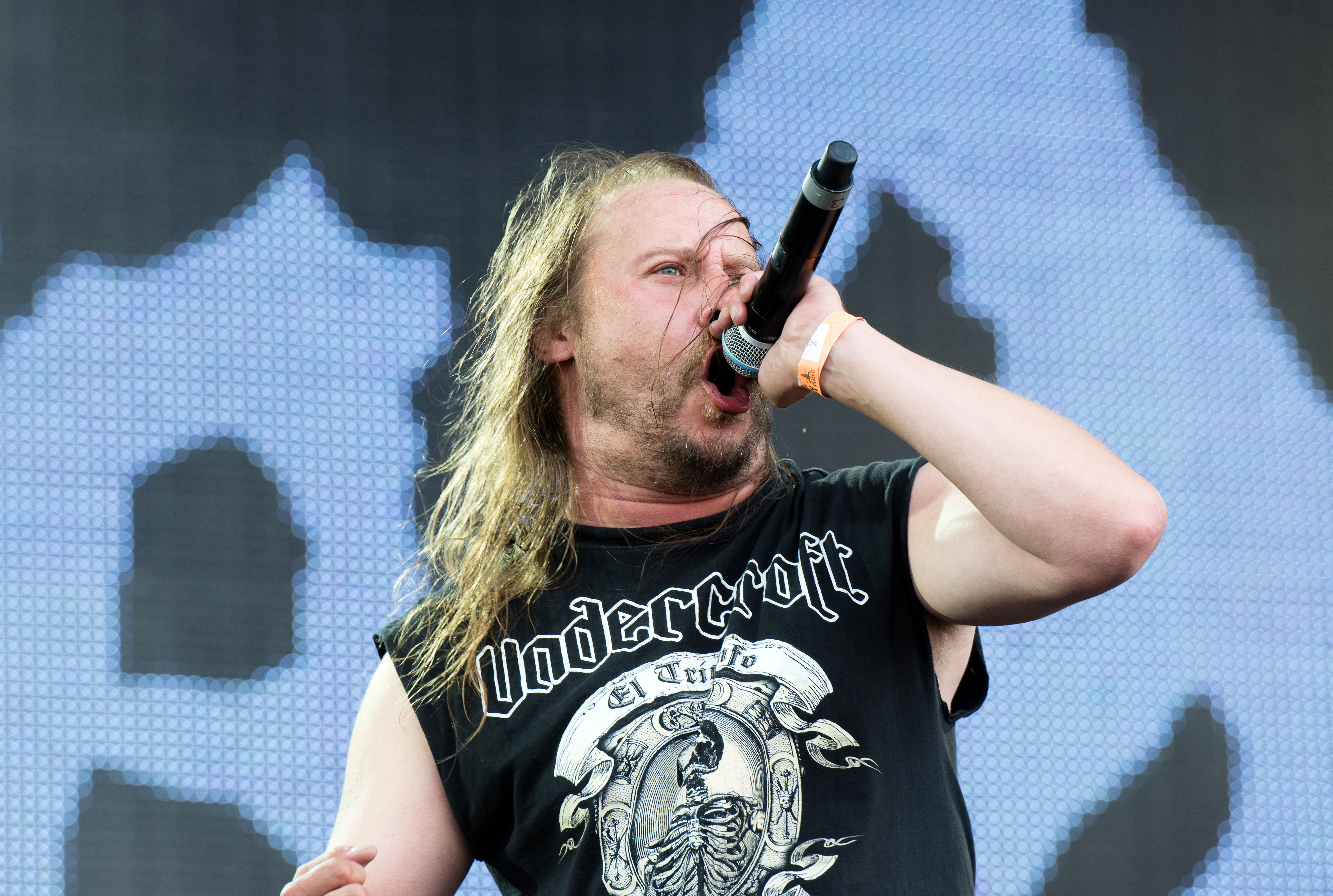 Entombed A.D. beim Wacken Open Air 2016